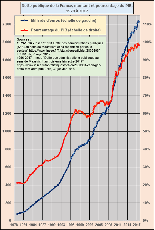 Dette des administrations publiques (S13) au sens de Maastricht (au sens du règlement n° 3605 de la Commission Européenne) en milliards d’€ et en pourcentage du PIB. Sources : 1979 à 1996 - Insee "3.101 Dette des administrations publiques (S13) au sens de Maastricht et sa répartition par sous-secteur" t_3101.xls, 7 sept. 2017 1996 à 2017,75 ; Insee "Dette des administrations publiques au sens de Maastricht au troisième trimestre 2017" 30 janvier 2018 31 décembre 1978 = 1979 sur le graphique